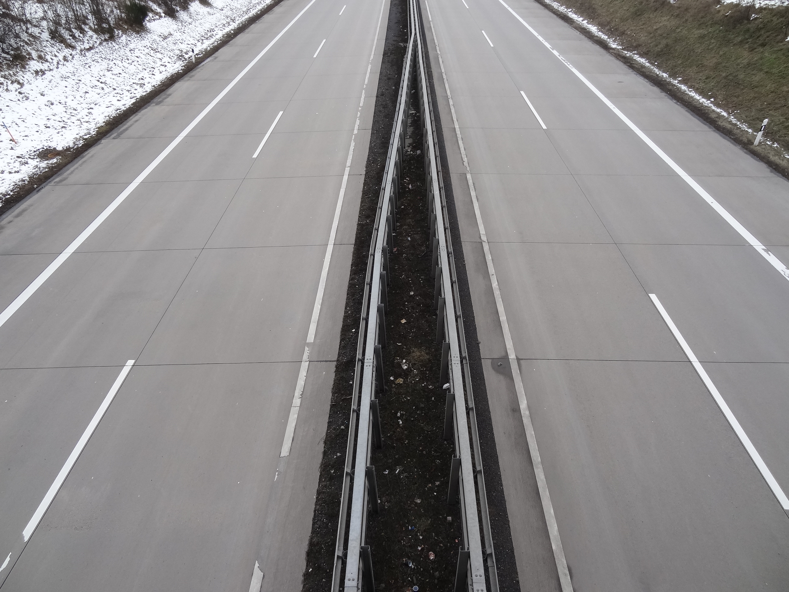 Bundesautobahn 5 bei Lich, Deckschicht mit Beton-Platten